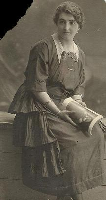 Candelas Llamas Torbado, esposa del matemático José del Corral Herrero e hija del médico burgués y activo republicano de Sahagún Emiliano Llamas Bustamante.